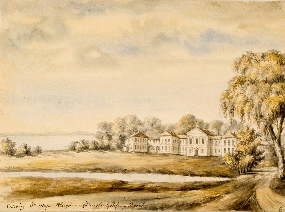 Беларуская (тарашкевіца): Асьвея (Aśvieja), сядзіба Шадурскіх (Šadurski)